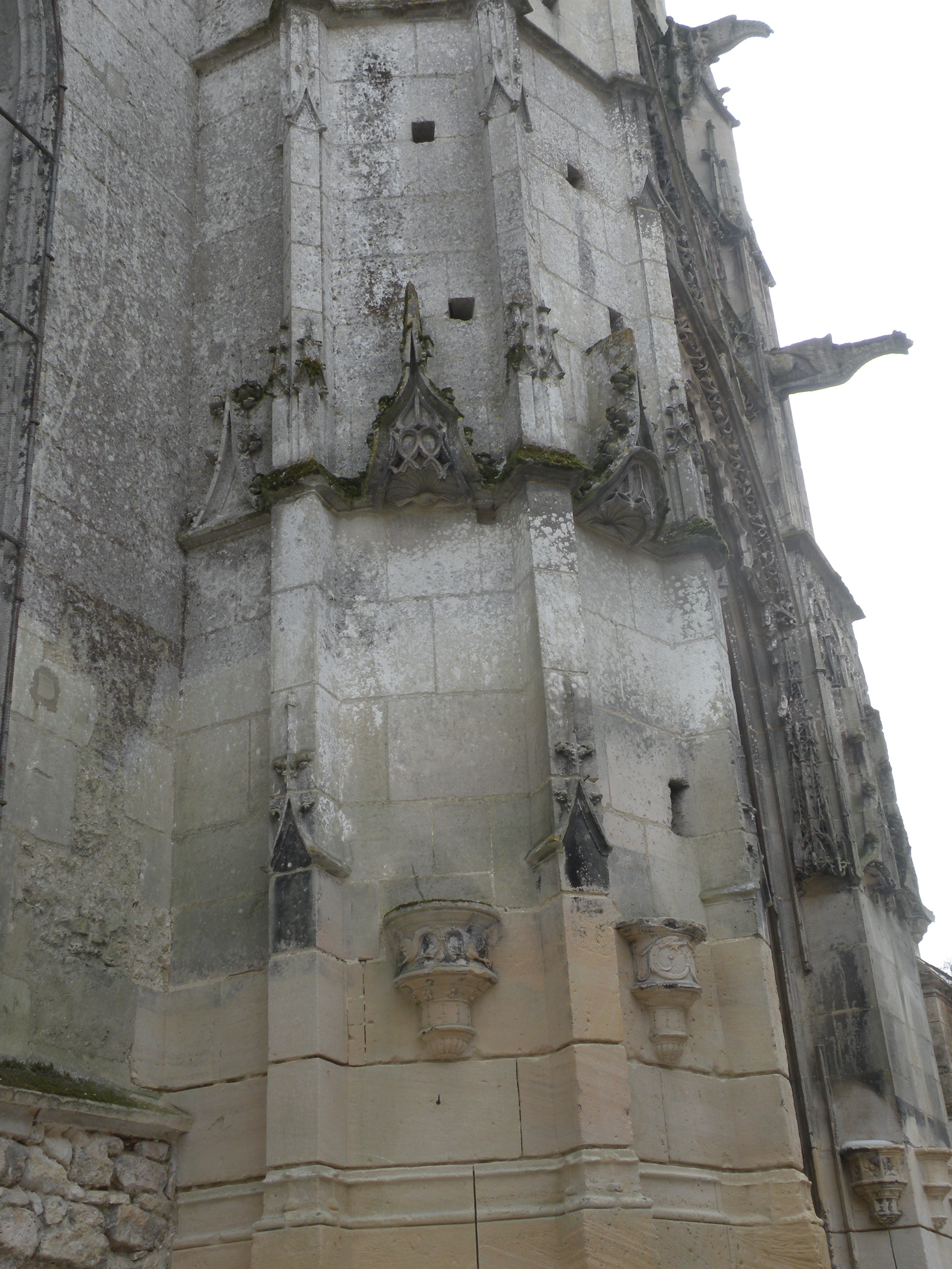 Église de chaumont en vexin détail niche exterieur